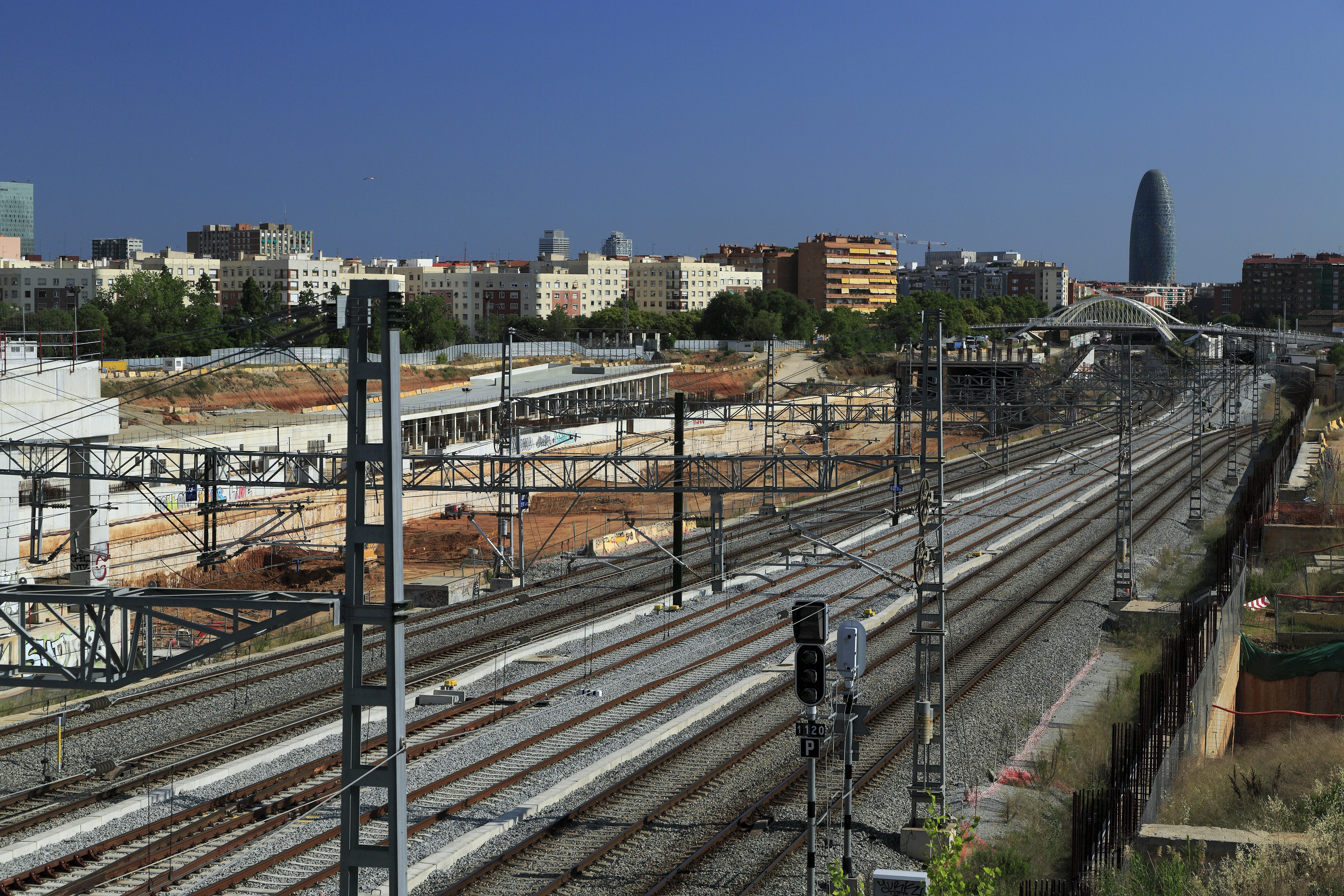 Richtung Zentrum, die Streckengleise wurden über das ehemalige Güterschuppen- und Ladegleisgelände aus dem Baubereich wegverlegt.